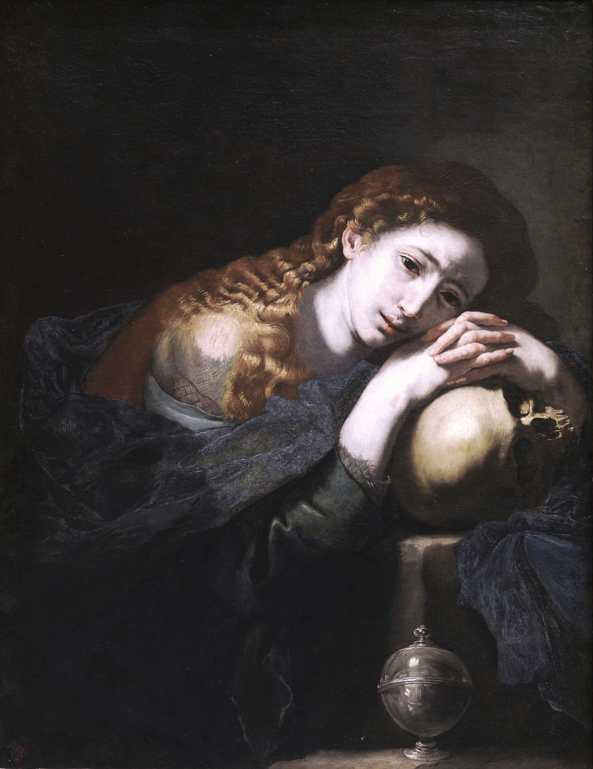 El lienzo muestra a Santa María Magdalena, una de las seguidoras de Jesucristo más cercanas a él, en actitud arrepentida y haciendo penitencia por sus pecados.